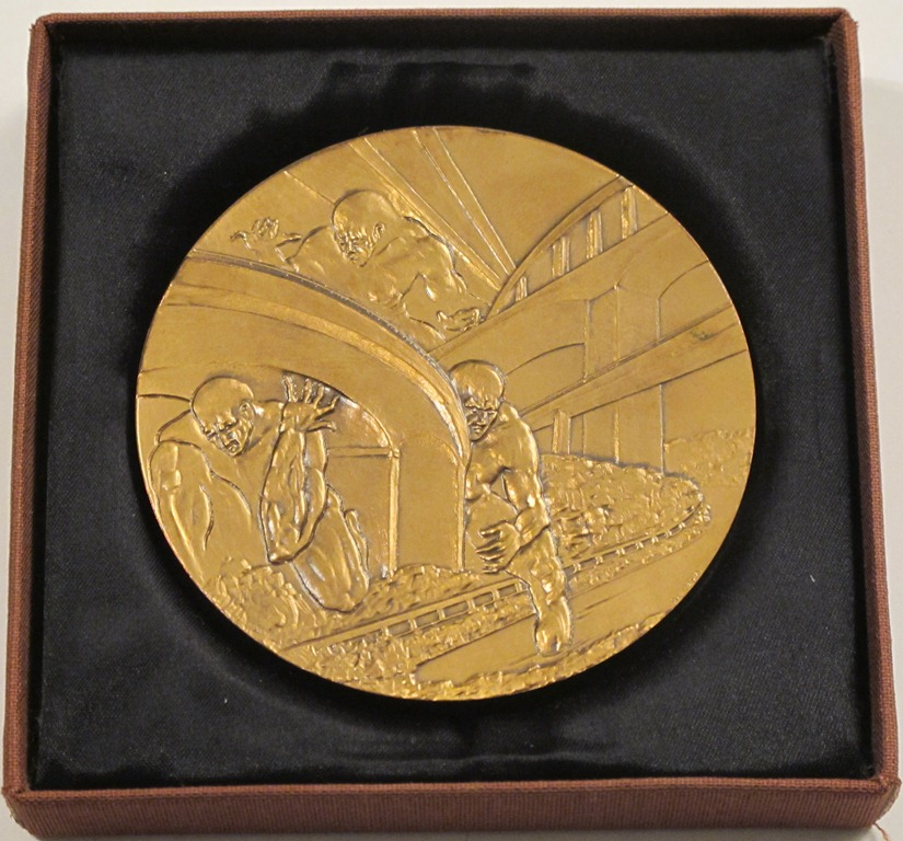 Médaille commémorative de l'inauguration de l'autoroute A40 (section Sylans - Châtillon-en-Michaille), décembre 1989. France.